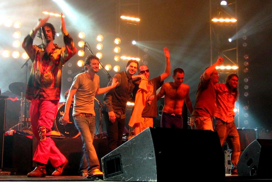 הופעה של שב"ק ס' בגני התערוכה בתל אביב